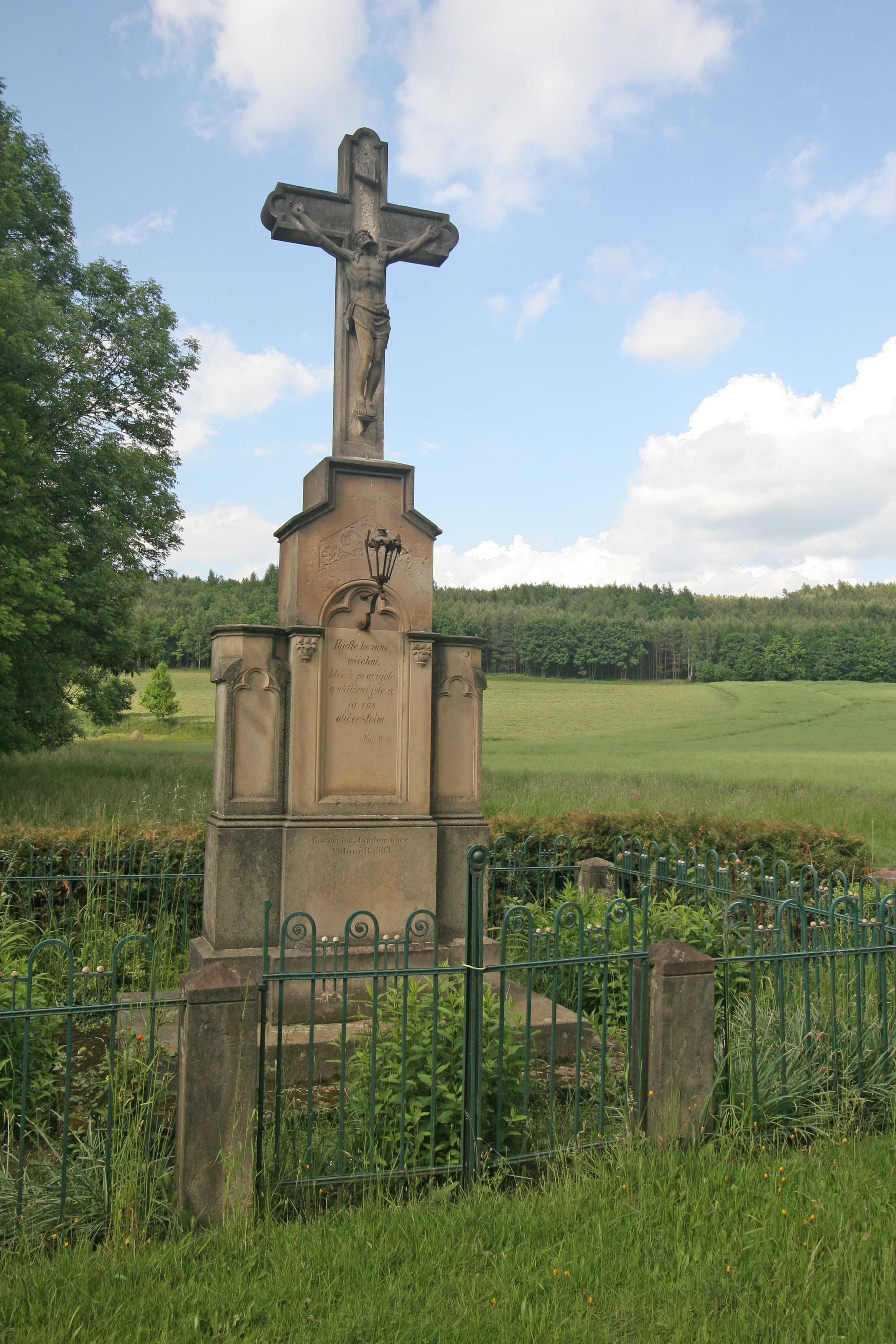 Vidoň křížek